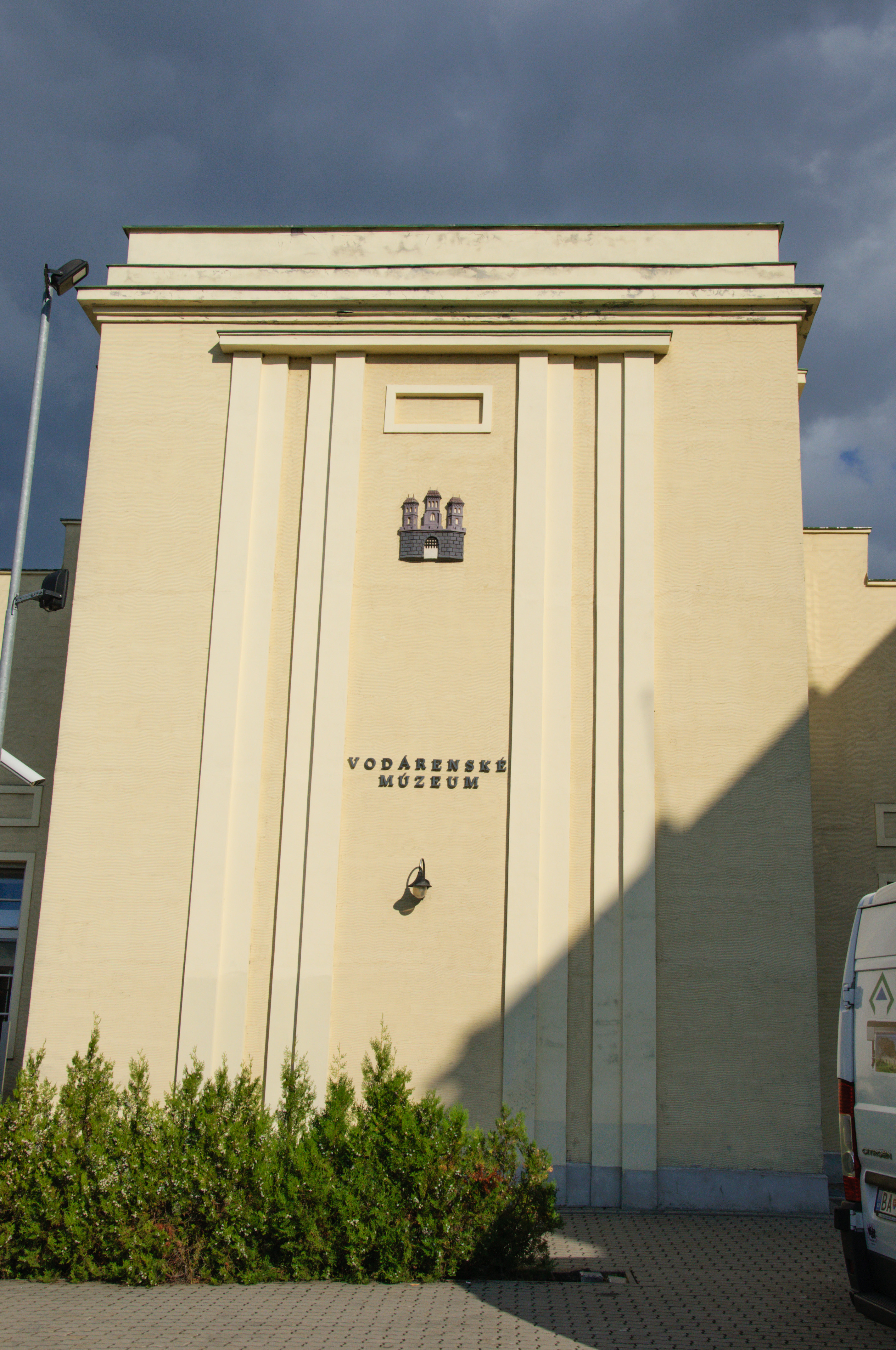 Štít s erbom mesta na vstupnej fasáde Vodárenského múzea, Bratislava - Karlova Ves